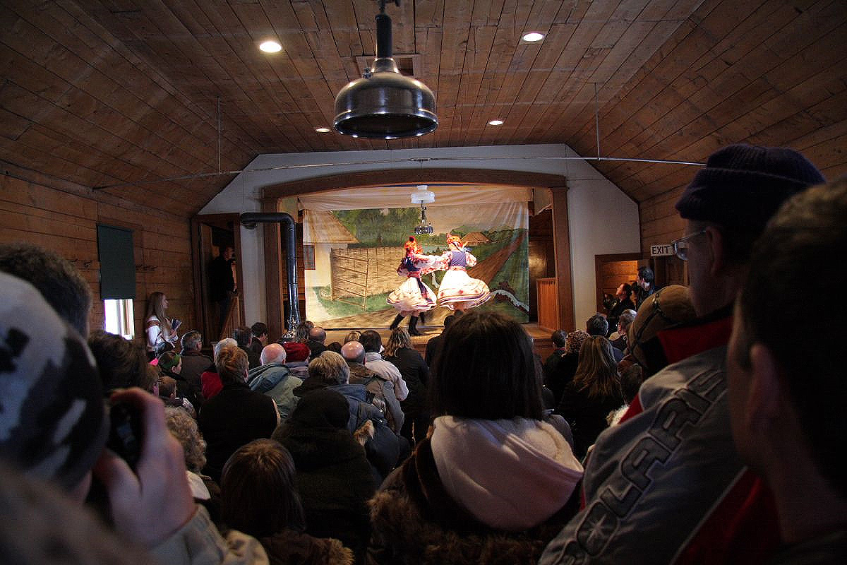 Вистава для відвідувачів Села спадщини україно-канадської культури